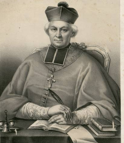 Portrait de Jean-Jacques Fayet (député, évêque)